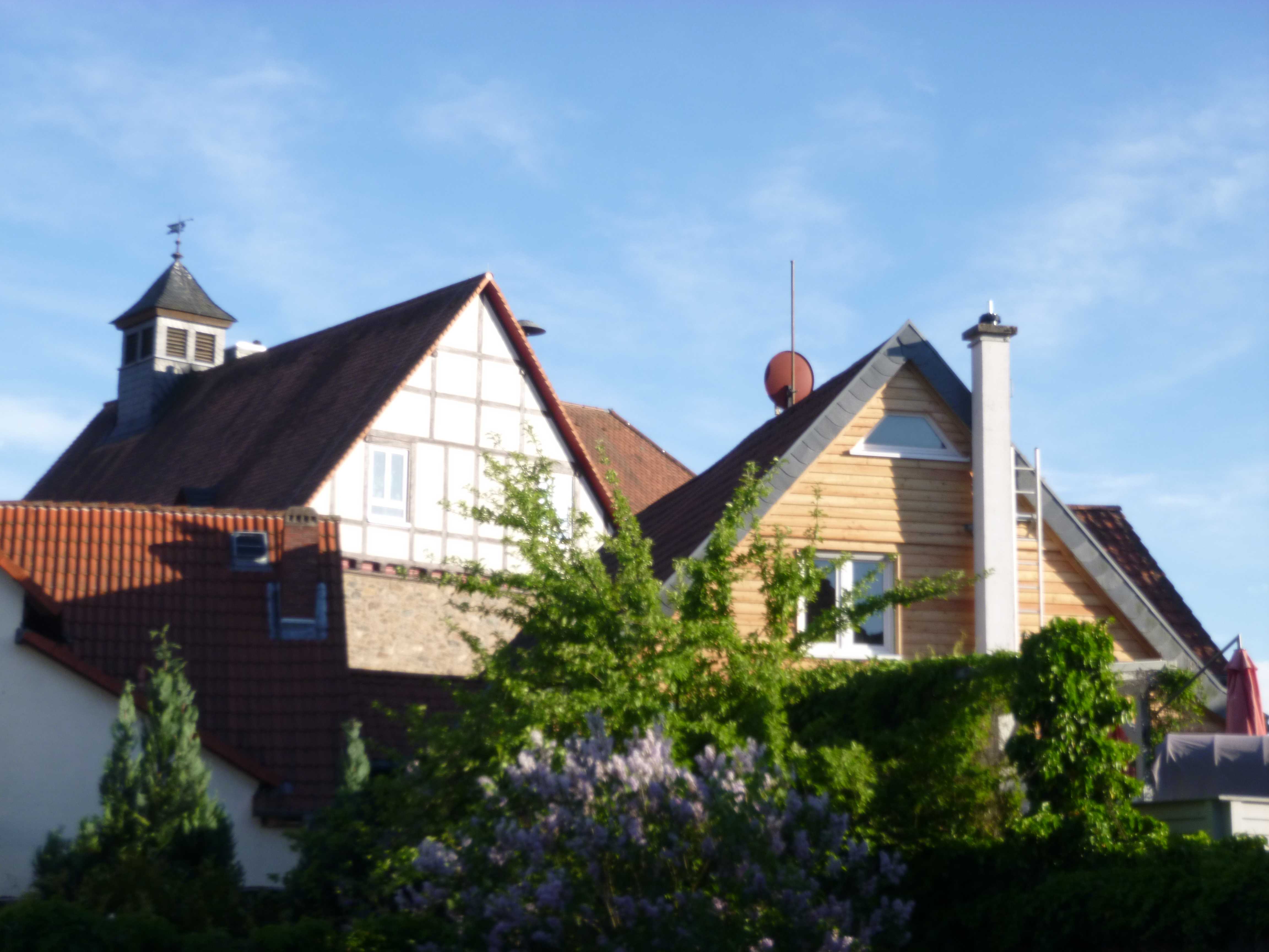 Domoj centre de Brandau, administra sidejo de la komunumo Modautal en Hesio, Germanio.